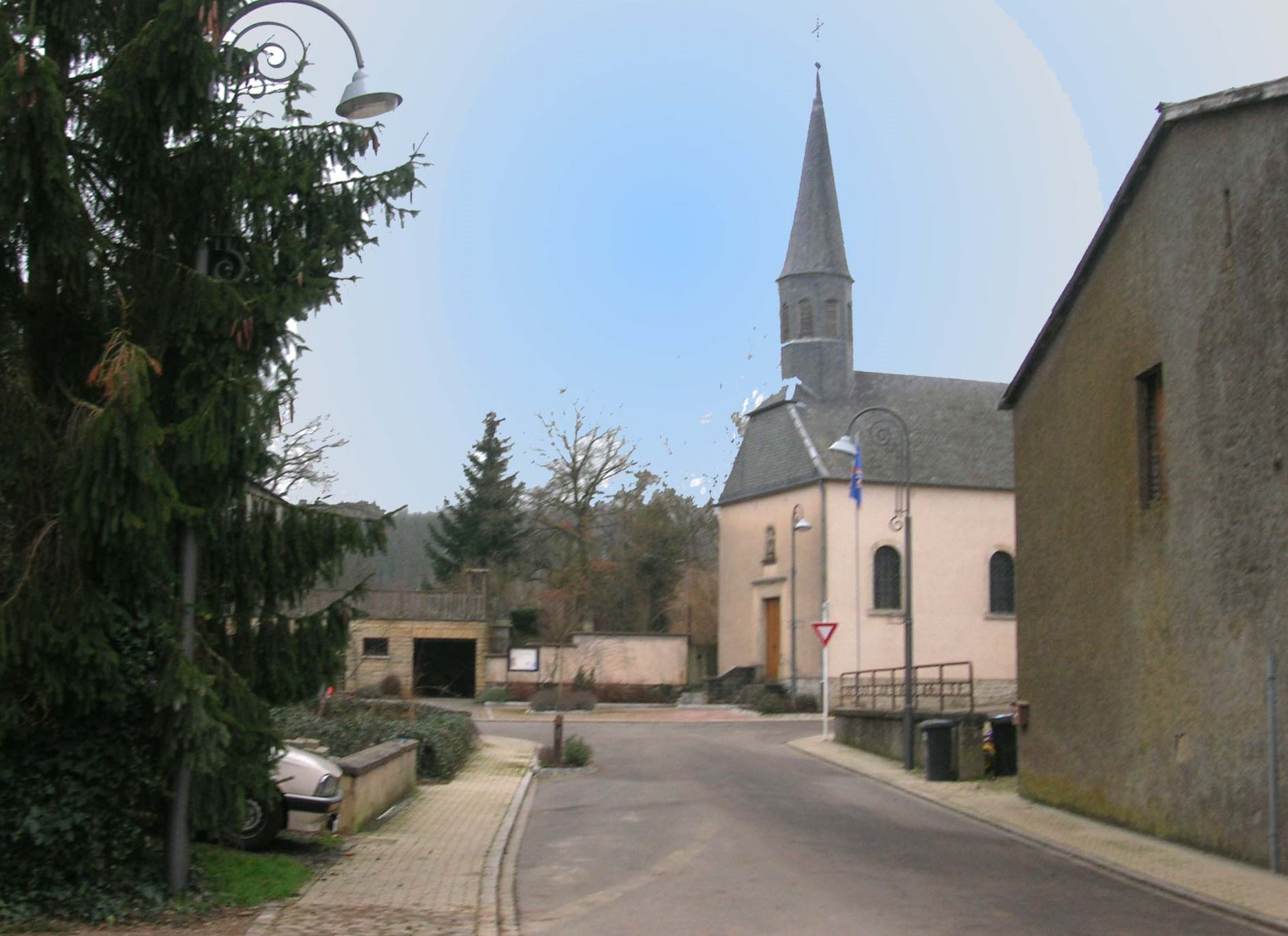 Sujet: D'Kierch vu Schweebech Source: Eege Foto vum user:ernmuhl Lizenz: Domaine public